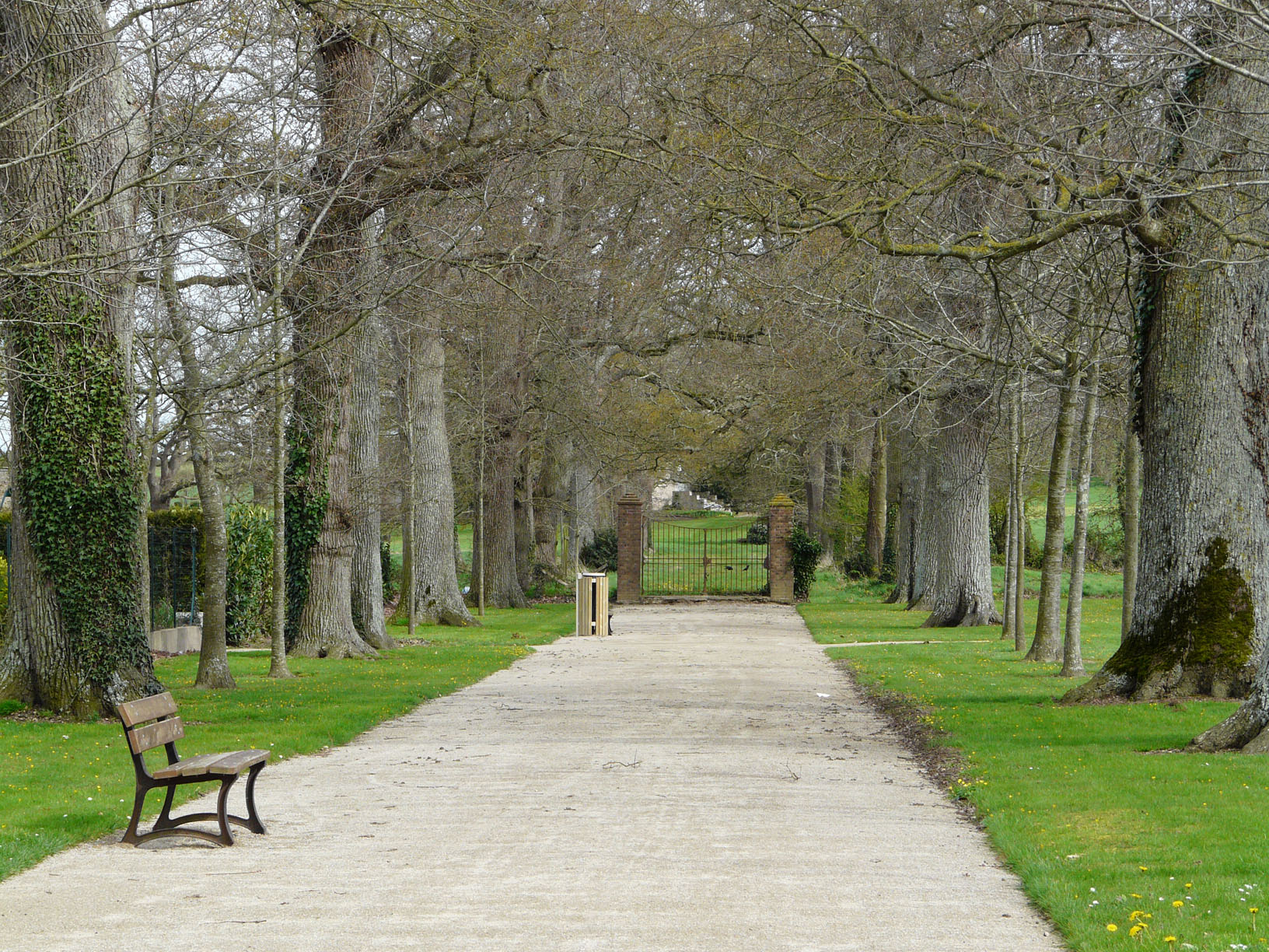 Allée des Chênes, ville de Mésanger (44)